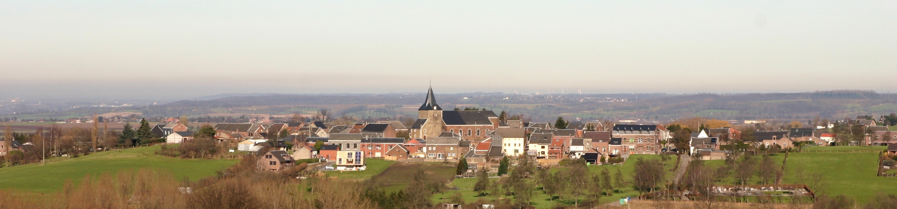 Mortier an der Provënz Léck.